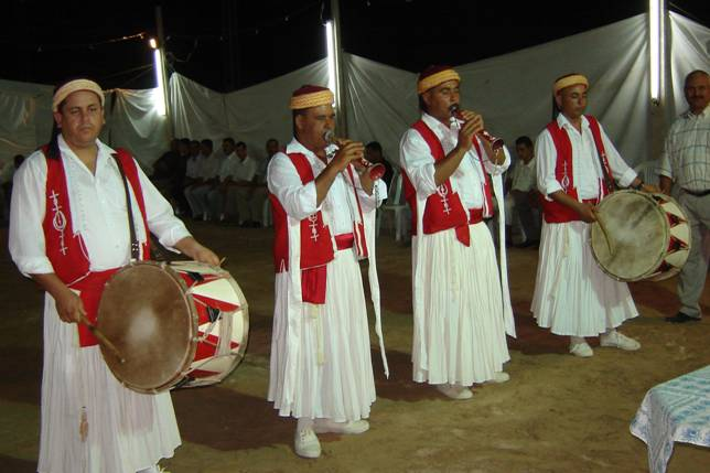 photo perso mars 2006 montrant la troupe folklorique de Kerkennah (Tunisie)